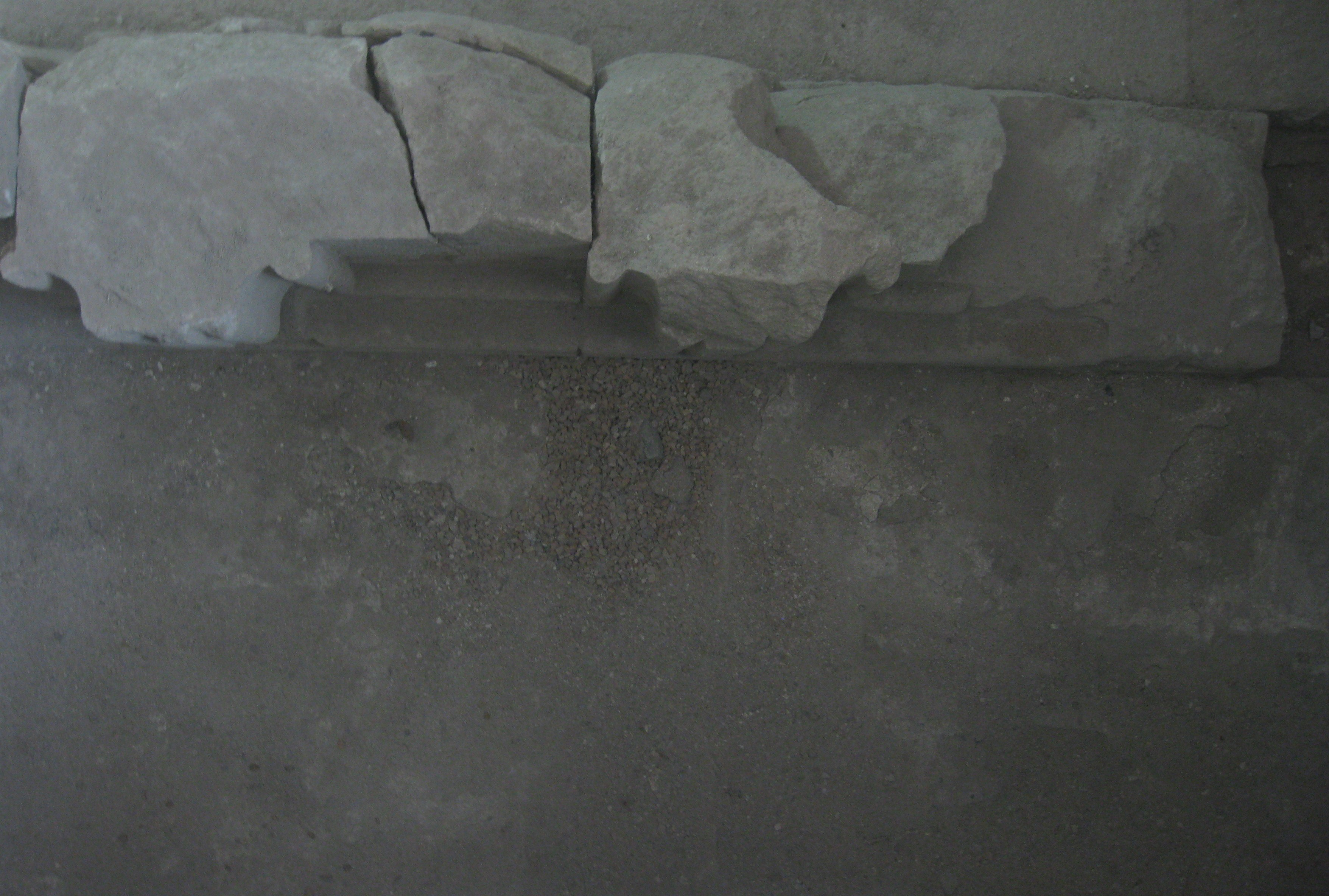 Acco (Acre, Akko) - Akko Saray Building. Today - a caltural centre. Remaines of a crusader church found under the Saray עכו בית הסאריה של עכו. כיום מרכז תרבות. שרידי כנסייה צלבנית שהתגלו מתחת למבנה הסאריה